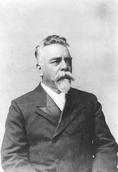 Fotografia de Campos Sales, quarto presidente do Brasil.